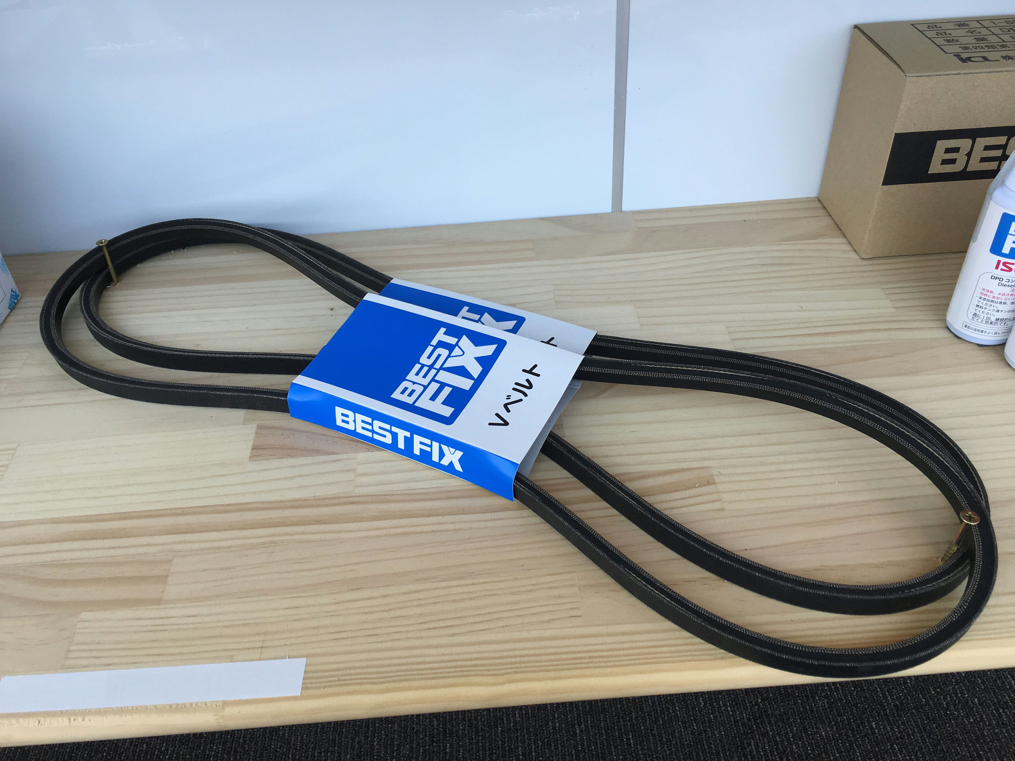 いすゞ自動車認定 アフターマーケット専用部品 BEST FIXブランドのVベルト。